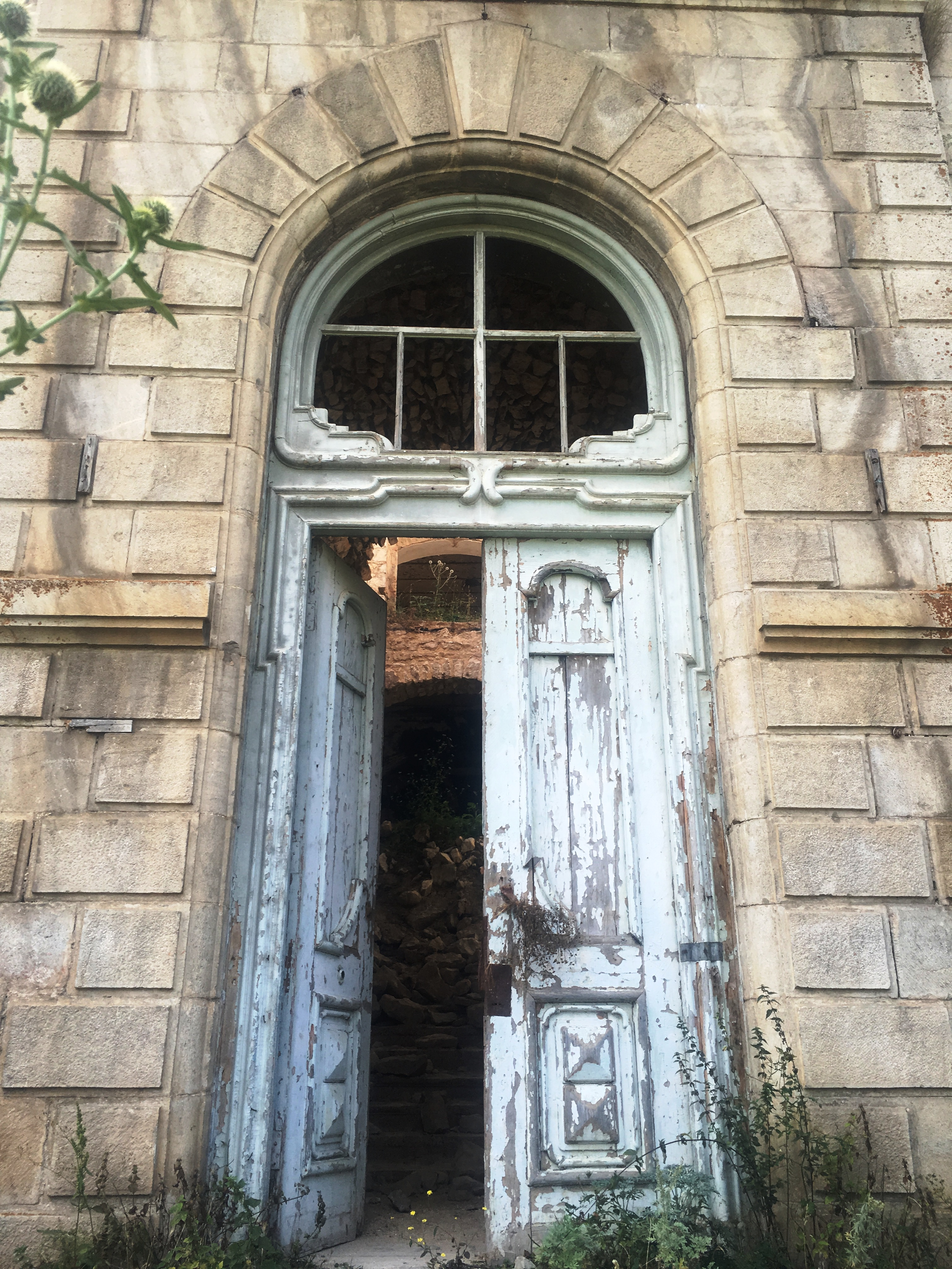 Ռեալական դպրոց